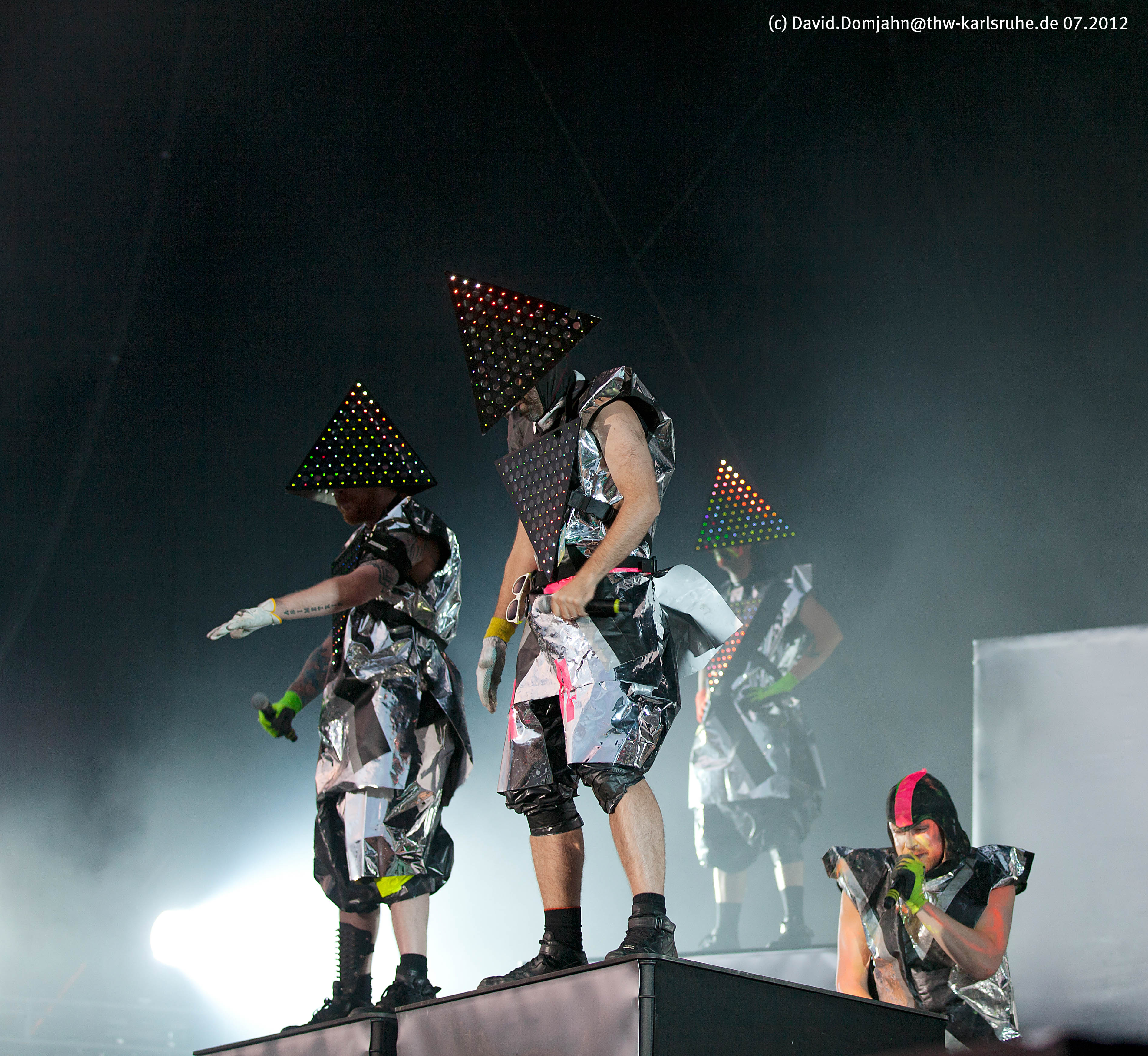 Deichkind auf dem Karlsruher Fest 2012